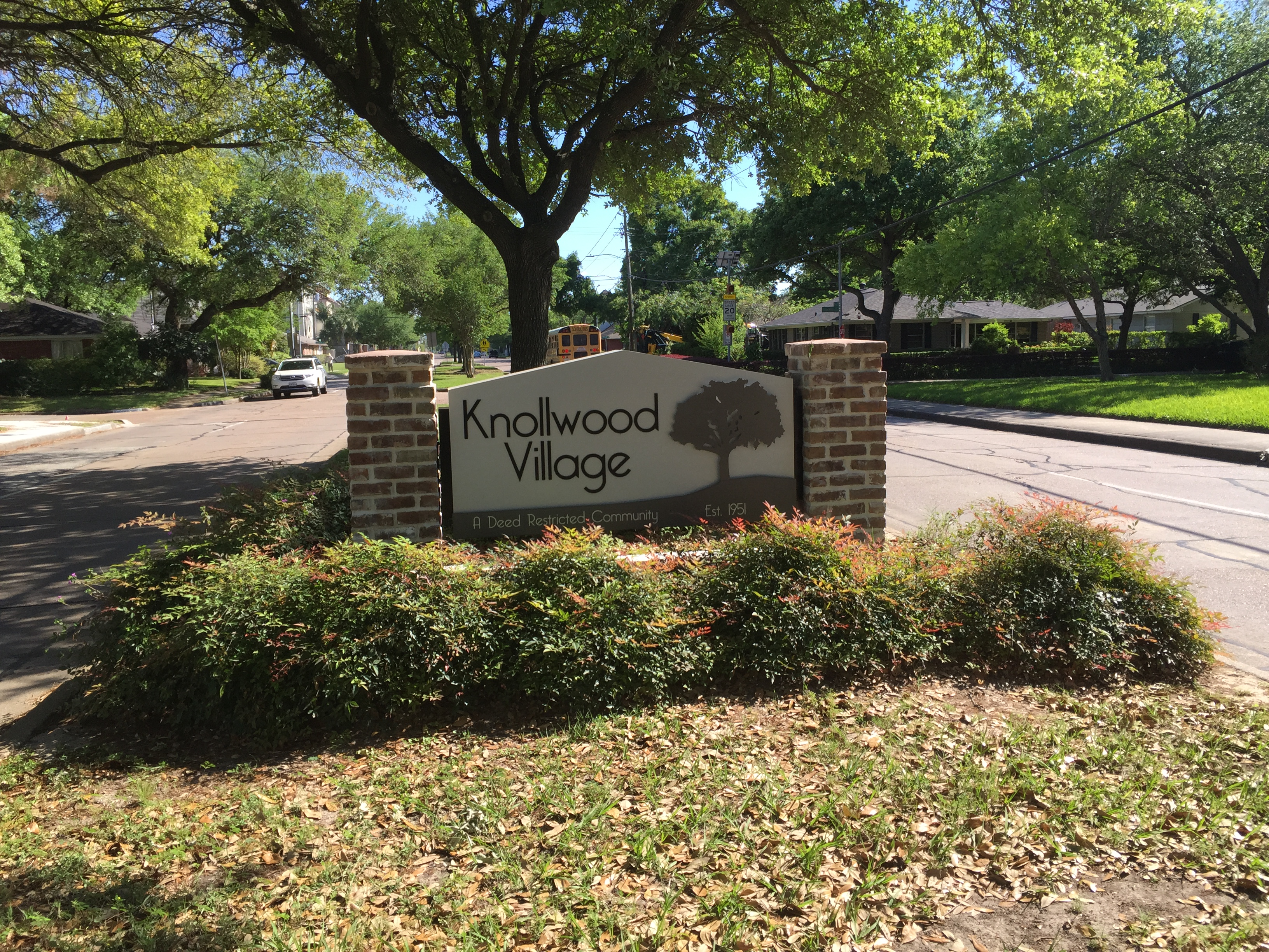 Knollwood Village